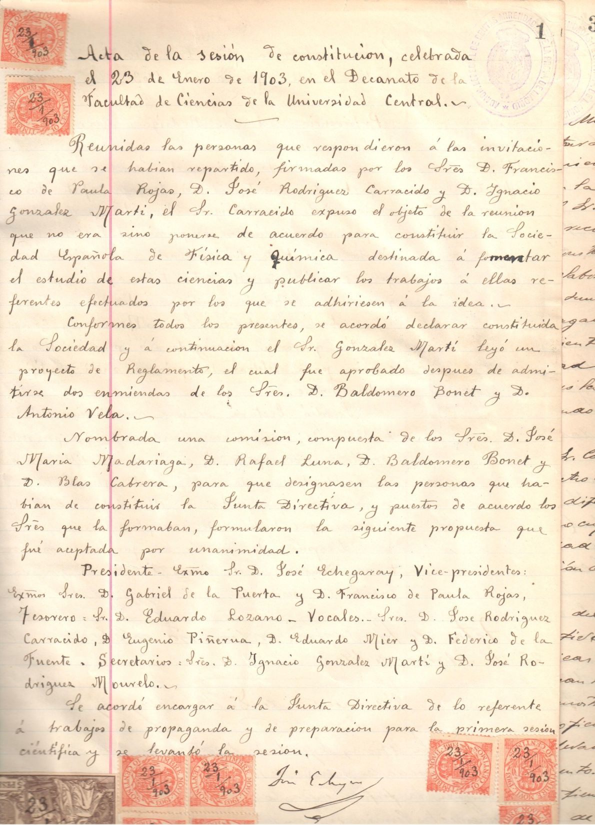 Acta de la sesión de constitución de la Real Sociedad Española de Física y Química. Celebrada el 23 de enero 1903 en el Decanato de la Facultad de Ciencias de la Universidad Central